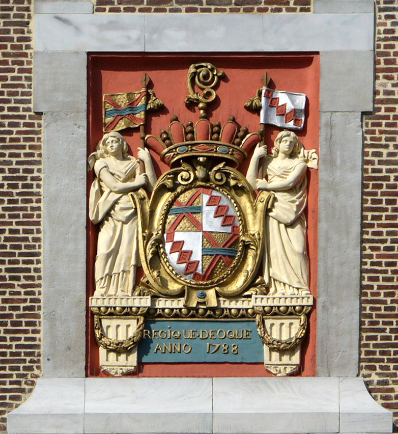 Wapenschild van Margaretha van Hamme abdis van Herkenrode Foto genomen door mijzelf, Willy Leenders op 29 maart 2008